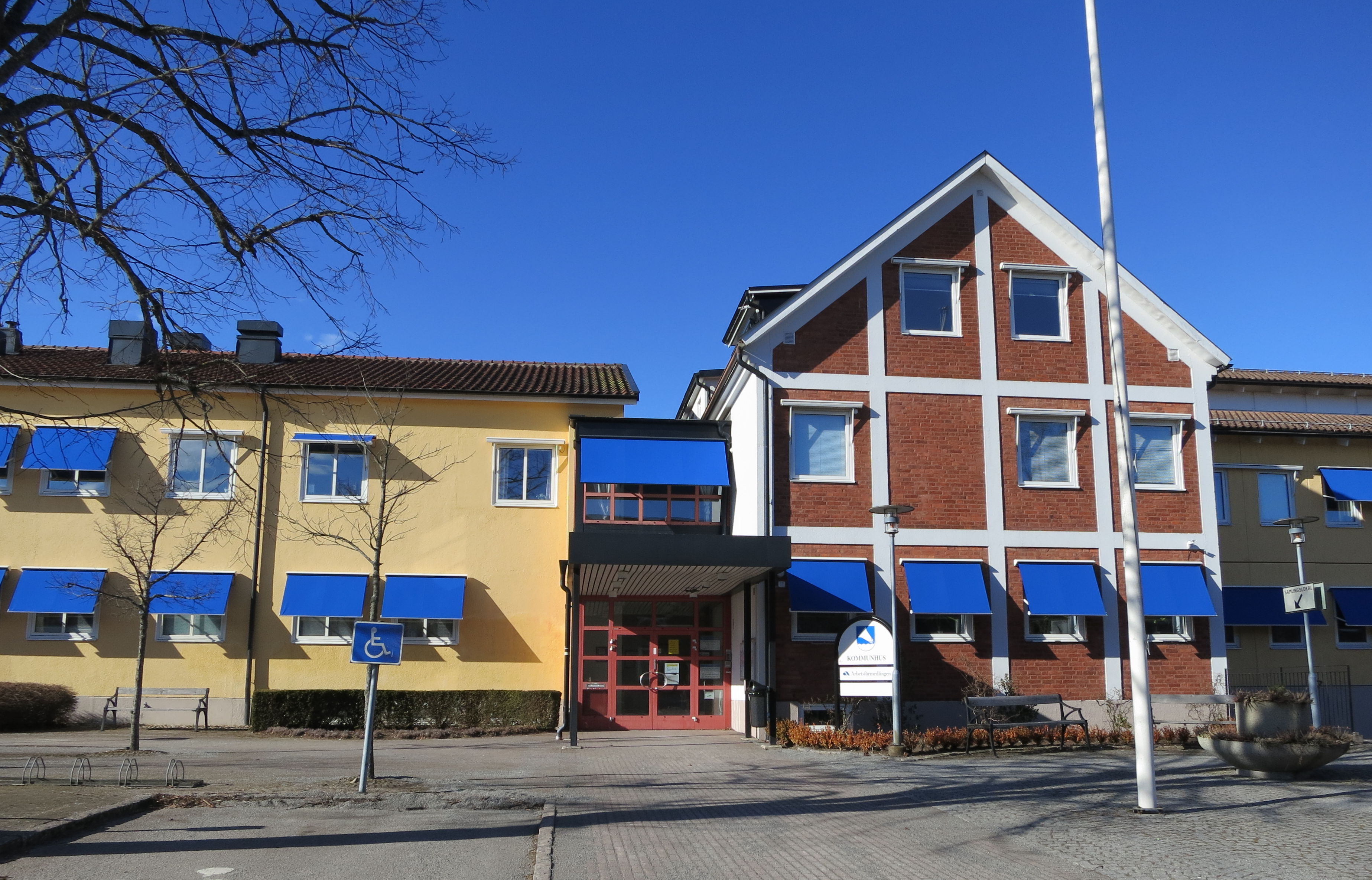 Örkelljunga kommunhus